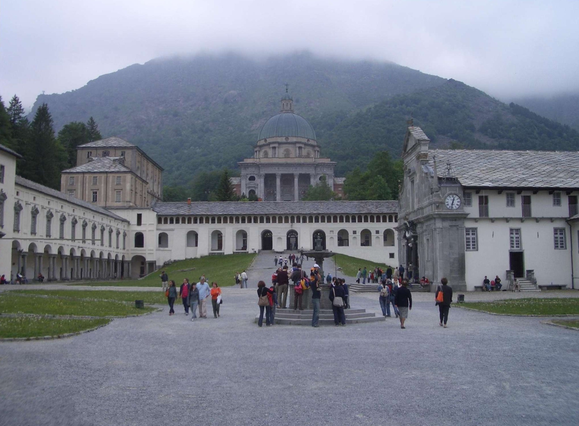 Photo of Santuario di Oropa, (Biella), Italy Biella